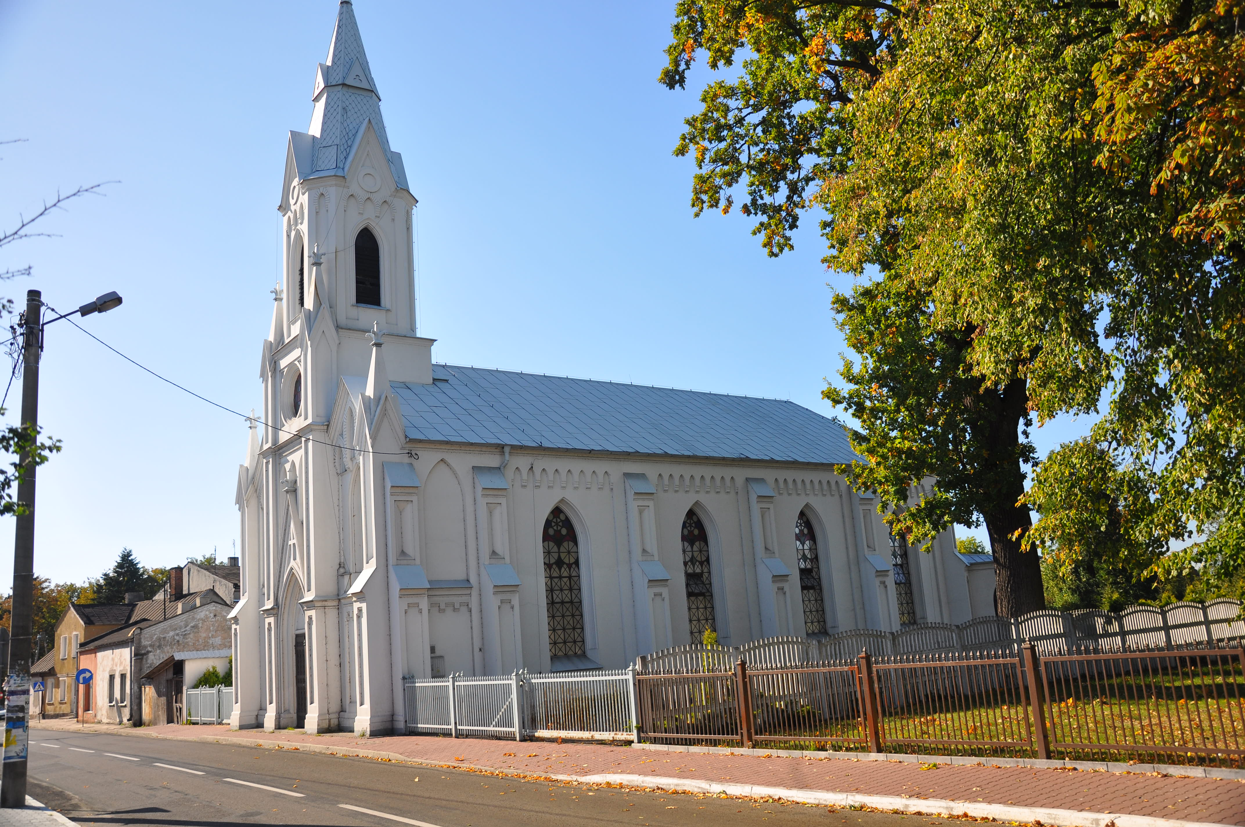 pl} Dąbie, ul. 1-go Maja 5, Dąbie